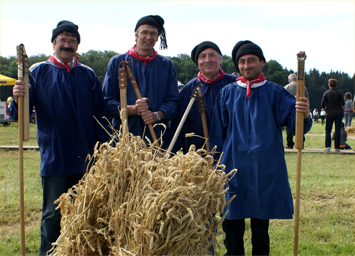 Landwirte aus Merklingen auf der Schwäbischen Alb führen in traditionellen Blauhemd zu besonderen Anlässen das Dreschen mit dem Dreschflegel vor.